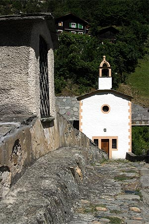 Ritibrücke mit Kapelle in Neubrück (Stalden)